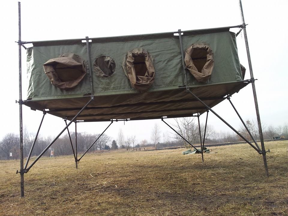 Widok dolny komory grupowej KG-12